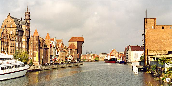 Motława in Gdańsk